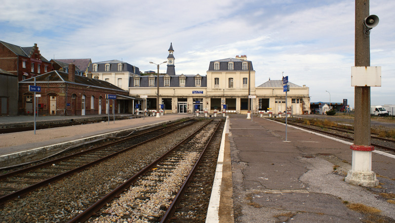 La gare de Mers-Le Tréport vue depuis les quais